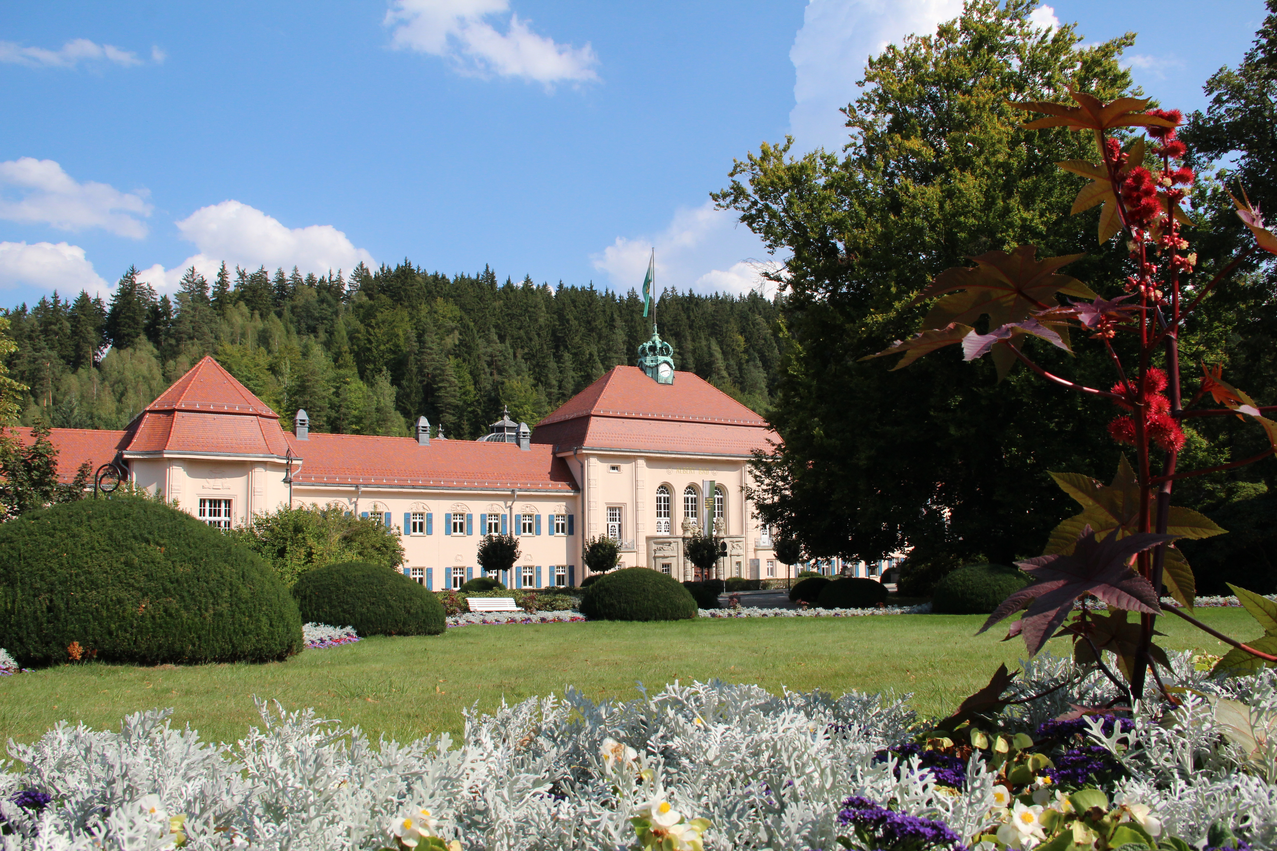 Bad Elster, König Albert Bad (Vogtland, Sachsen, 2012)